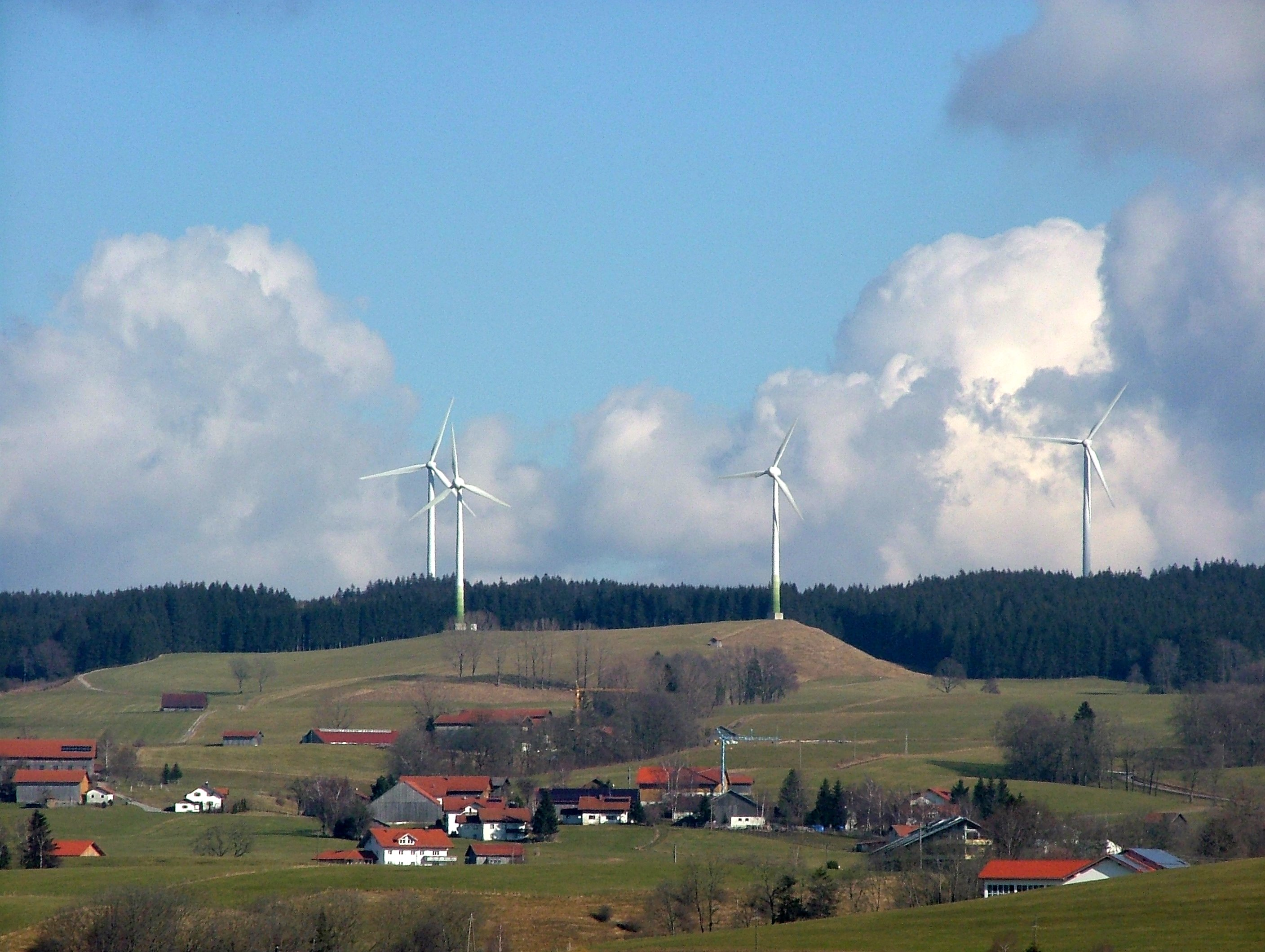 Windpark Wildpoldsried